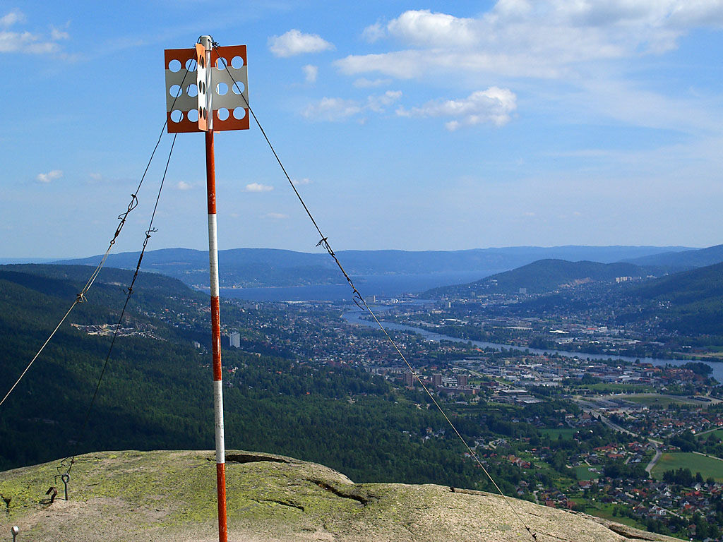 Drammen panorama